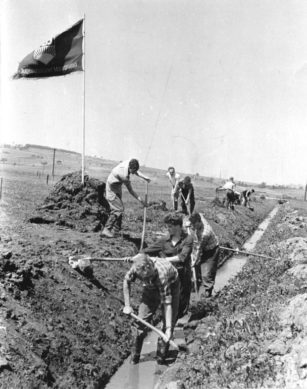 Meliorationsarbeiten durch FDJ Zentrabild-Köhne 14.5.1959 Unsere Wische ist der Moorgrund - Jugend des Kreises Bad Salzungen melioriert 200 Hektar Wiesen. 200 Hektar versauerte und mit Leberegeln verseuchte Wiesen des sogenannten Moorgrundes im Kreis Bad Salzungen als Objekt der Jugend innerhalb von drei Jahren zu meliorieren, hat sich der Kreisverband der FDJ vorgenommen. Seit fast einem Monat sind junge Arbeiter und Angestellte aus Betrieben des Kreises in Einsätzen von jeweils 2 Wochen dabei, Gräben zu räumen und die vom Grabenräumpflug der MTS Stadtlengefeld gezogenen Gräben fertigzustellen. In diesem Jahr will die Jugend zwölf Kilometer Gräben in Ordnung bringen. UBz: Blick auf die Arbeitsstelle der 10 Jugendfreunde aus verschiedenen Betrieben des Kreises Bad Salzungen.